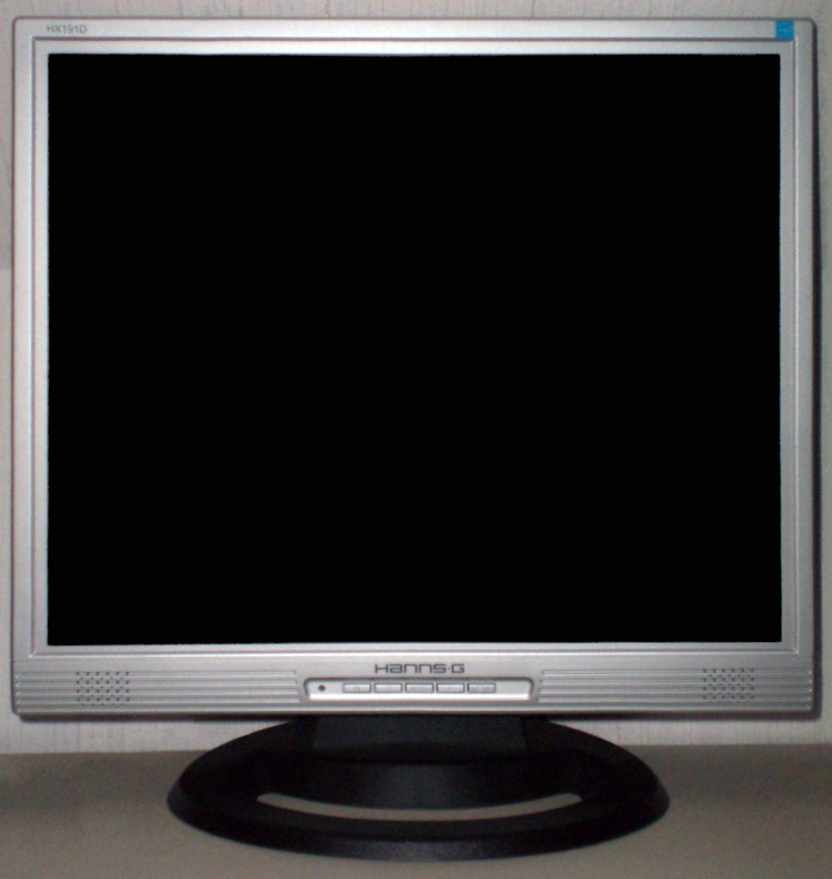 HannsG-Monitor HX 191D